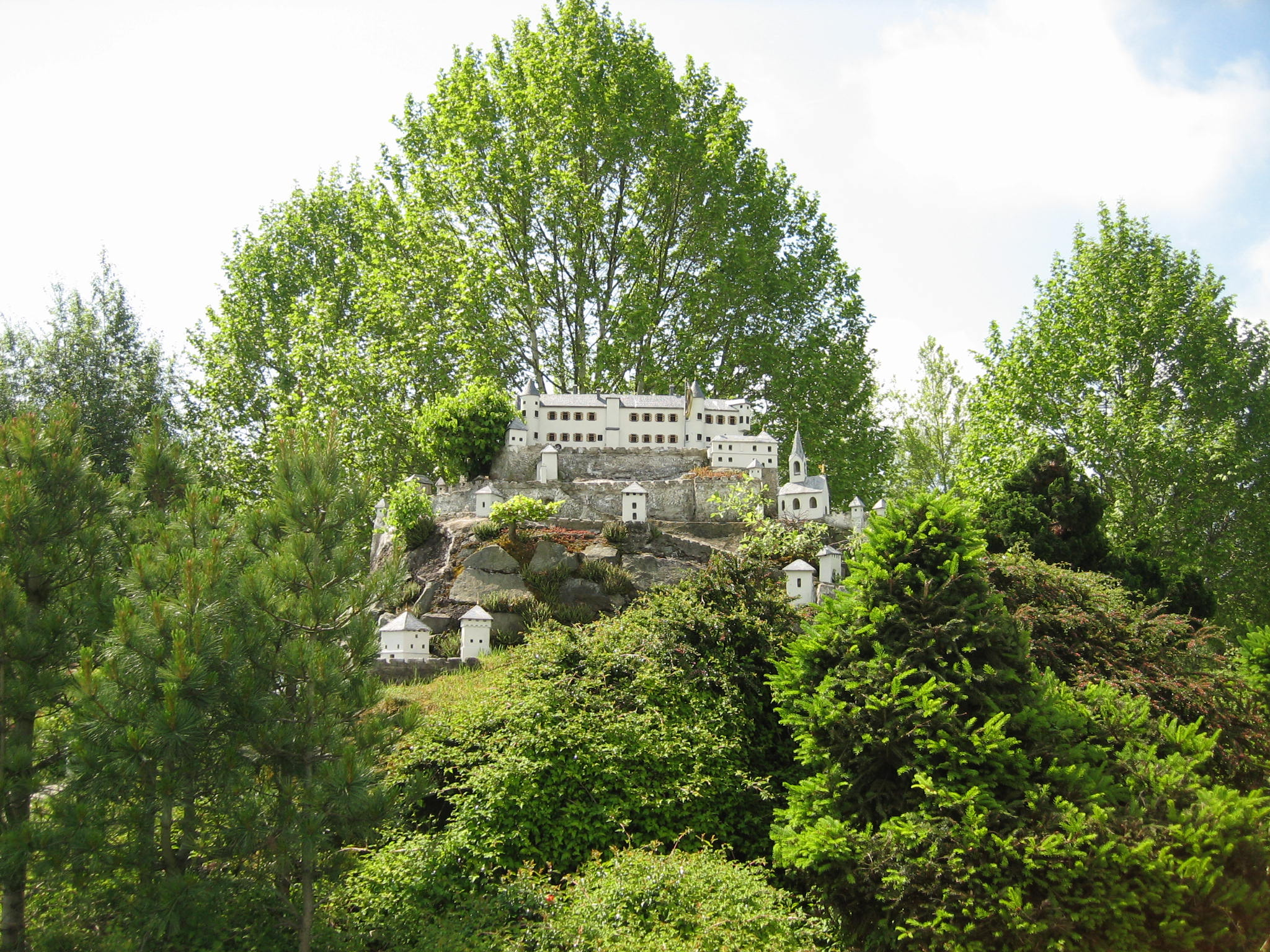 Hochosterwitz castle - 1:25 scale model at Minimundus